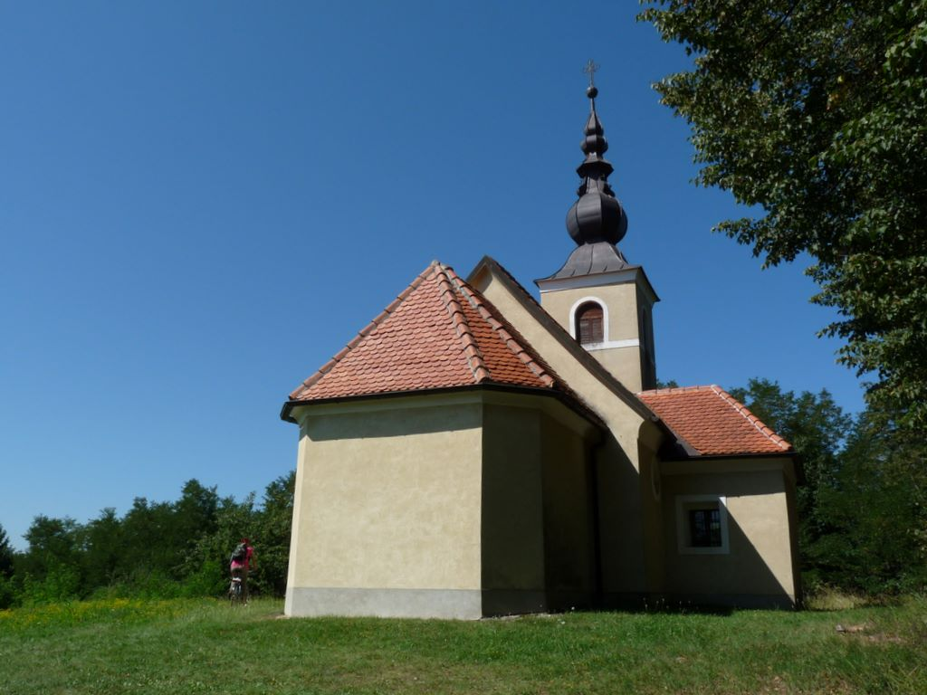 Cerkev sv. Štefana v Nemški vasi (Občina Krško), jugovzhodna Slovenija.